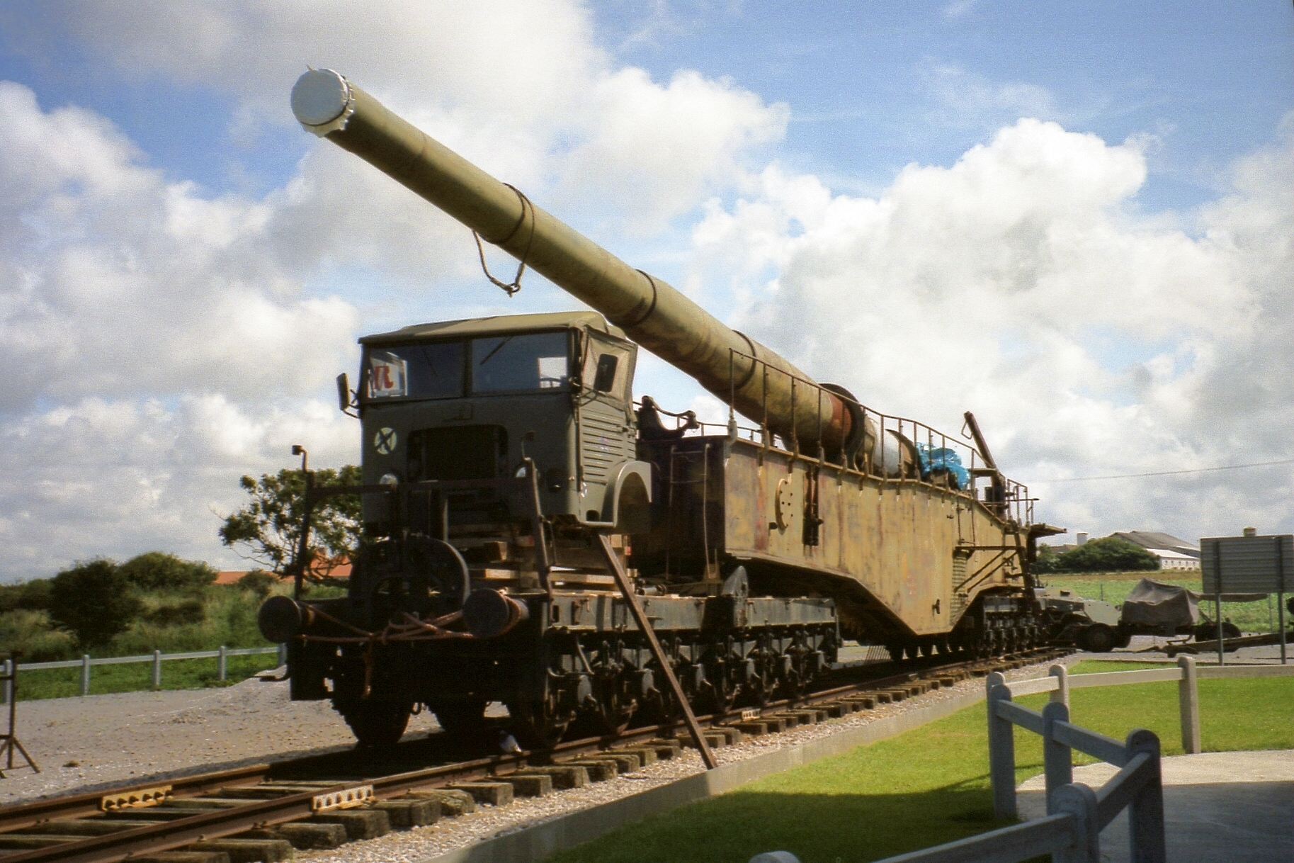 280-mm-Eisenbahngeschütz K 5 E Audinghen 01.08.93